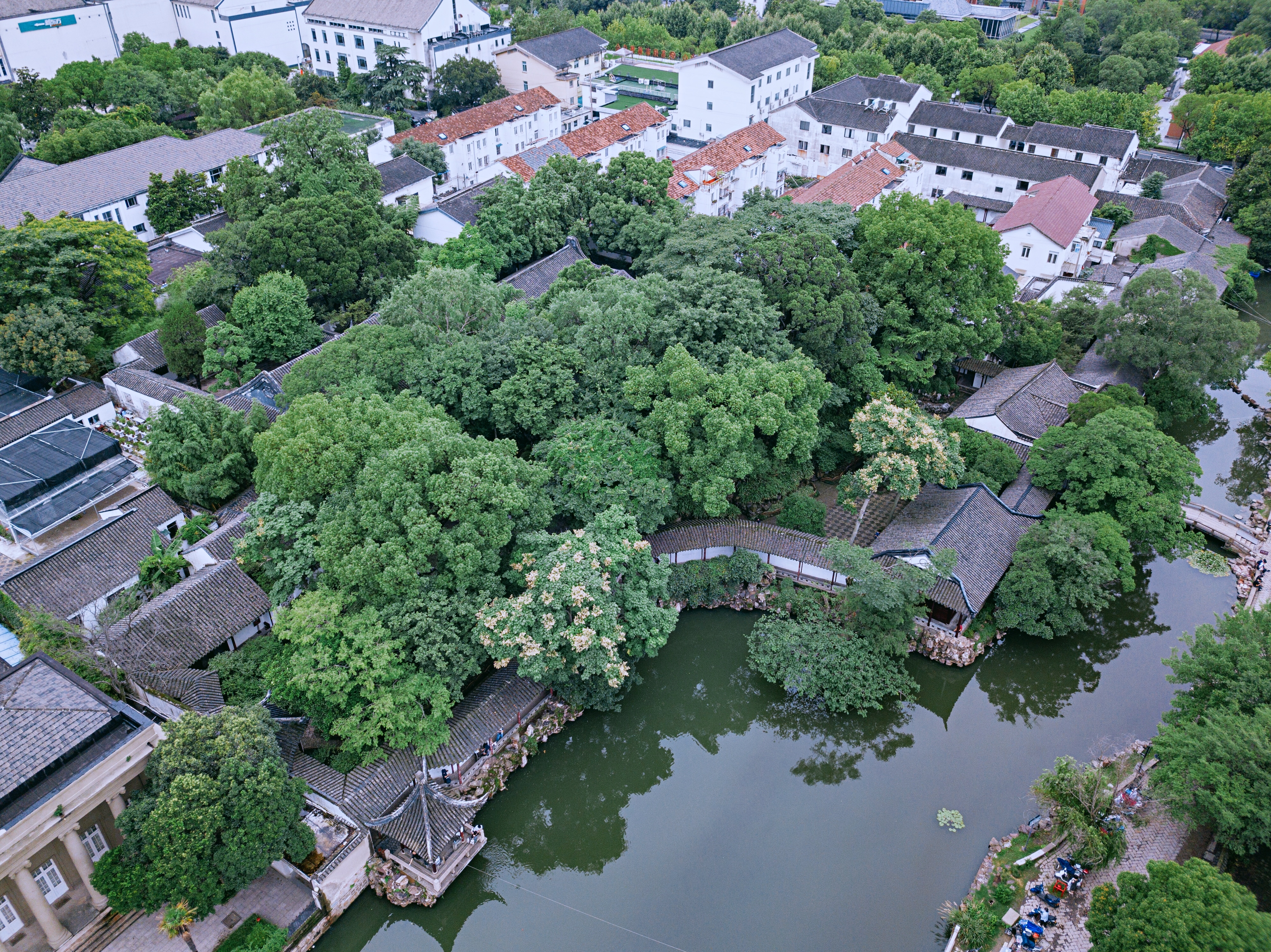 中文（中国大陆）: 苏州沧浪亭全景